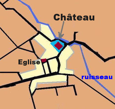 proposition de la situation du château disparu d'Eckendorf, commune d'Alteckendorf (67270)